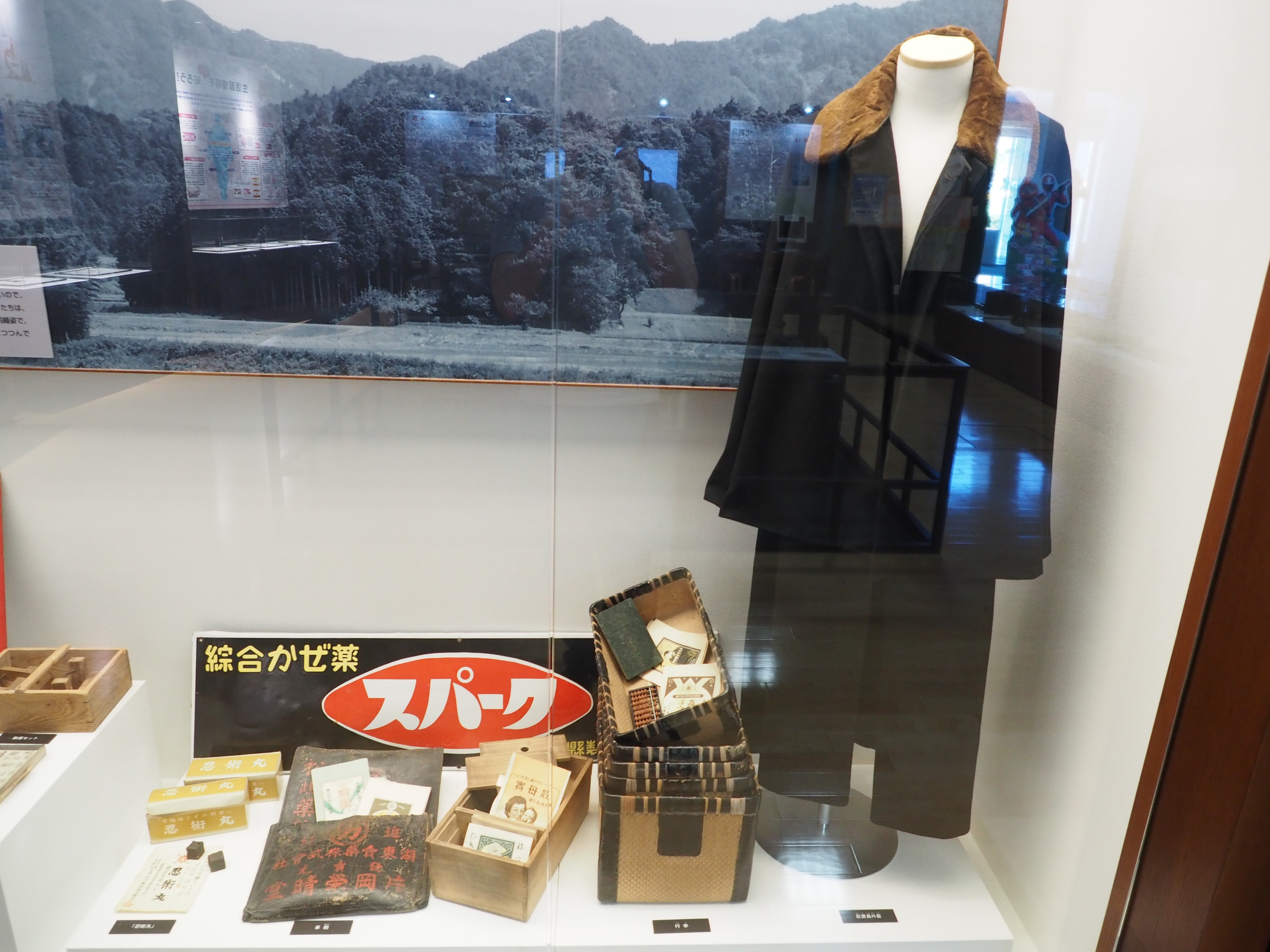 甲賀のくすり配置員（甲賀市くすり学習館）